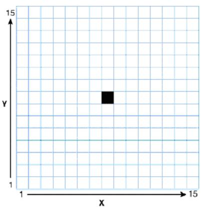 Raster kujutise elementaarrakk – piksel